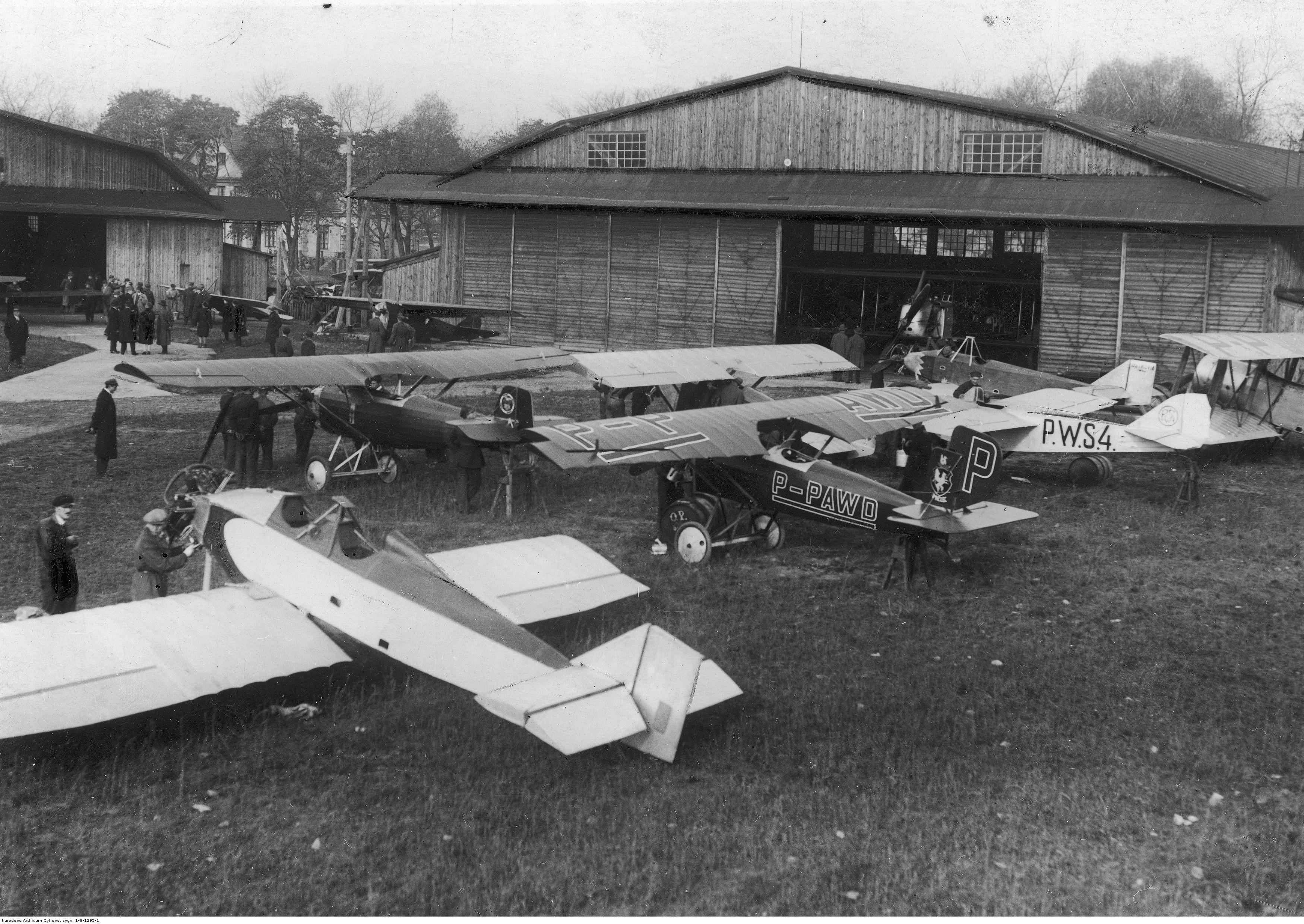 Awionetki stojące przed hangarami podczas II Krajowego Konkursu Awionetek w Warszawie - na pierwszym planie z lewej WK-1 Jutrzenka, w środku DKD-III (P-PAWD), po prawej PWS-4. Przed DKD-III samolot DKD-IV, a za PWS-4 na tle otwartych drzwi hangaru WK-1 Ostrovia I.